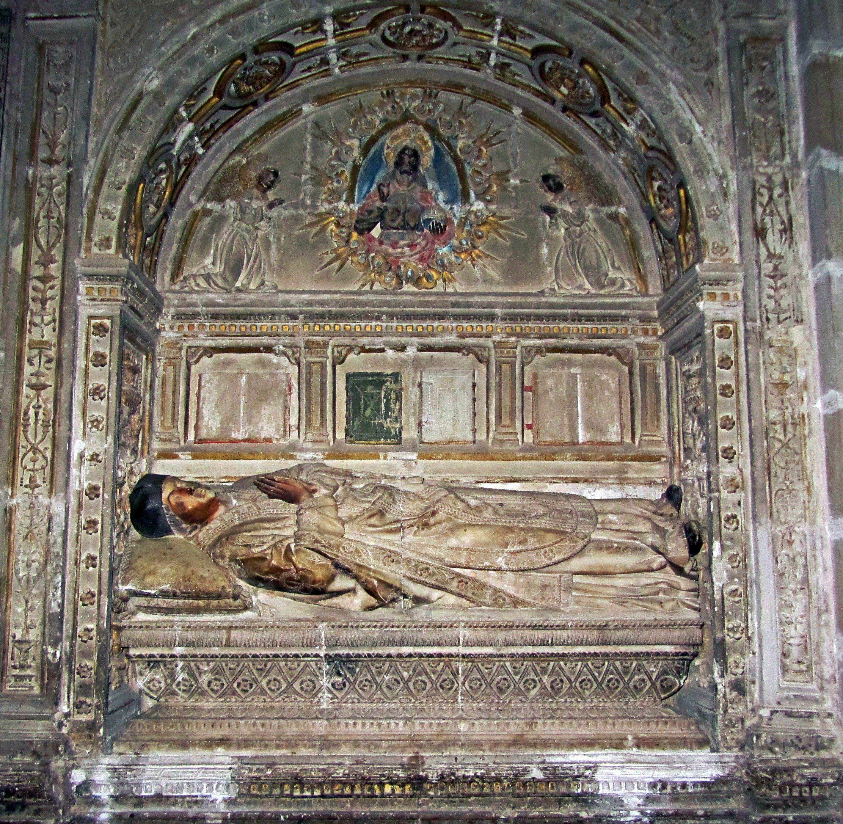 Sepulcro del obispo Fernando Montemayor en la catedral de Sigüenza. España